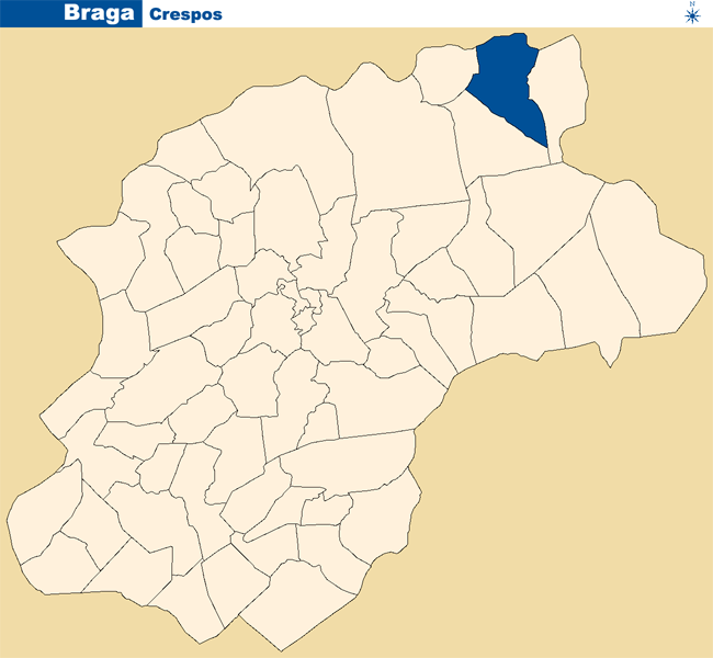 Localização de Crespos em Braga.